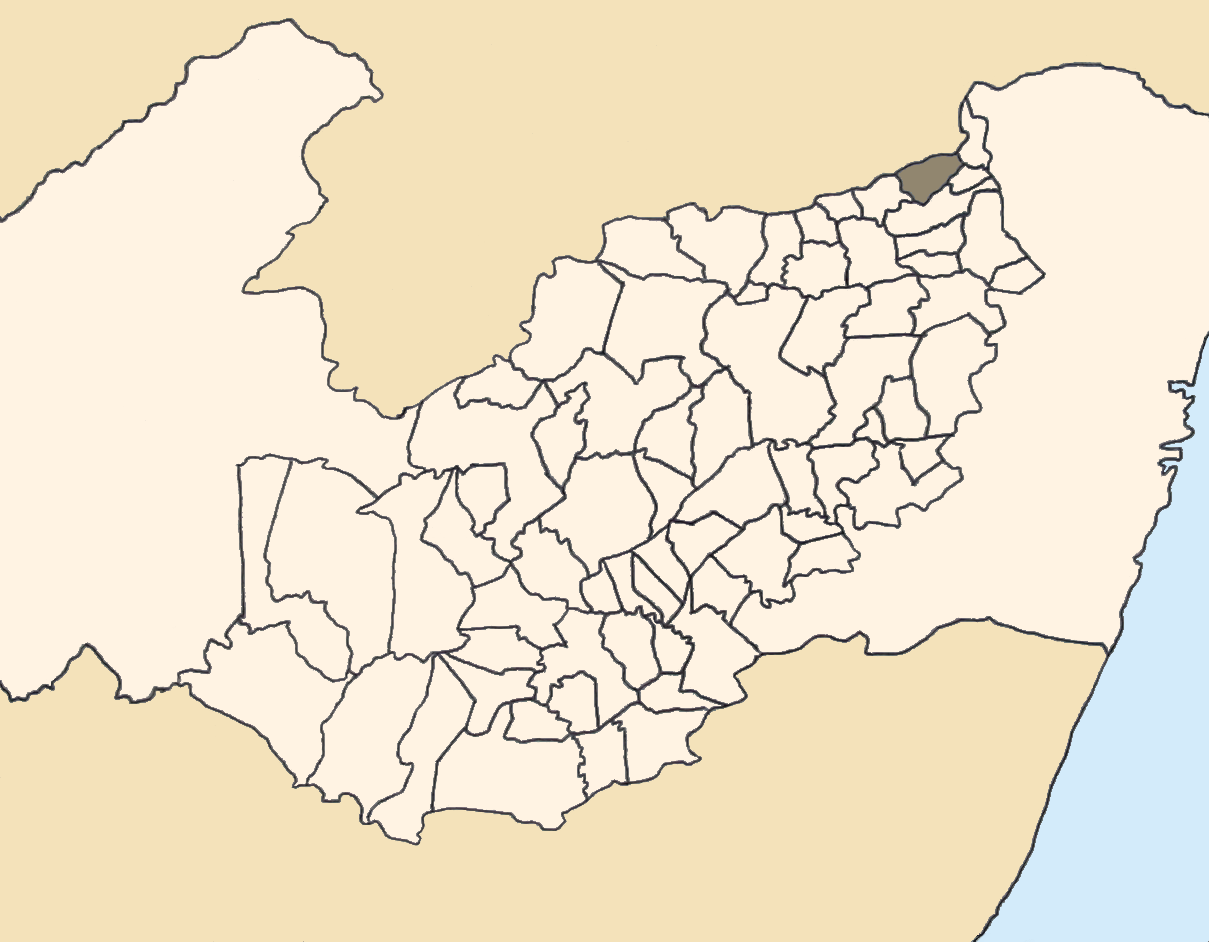 Mapa da mesorregião Agreste de Pernambuco (Brasil) subdivida em municípios. Em destaque, o município de Orobó. Map of the brazilian state of Pernambuco (mesorregião Agreste) showing the city of Orobó. Imagem tratada com o GIMP. Image made with GIMP.